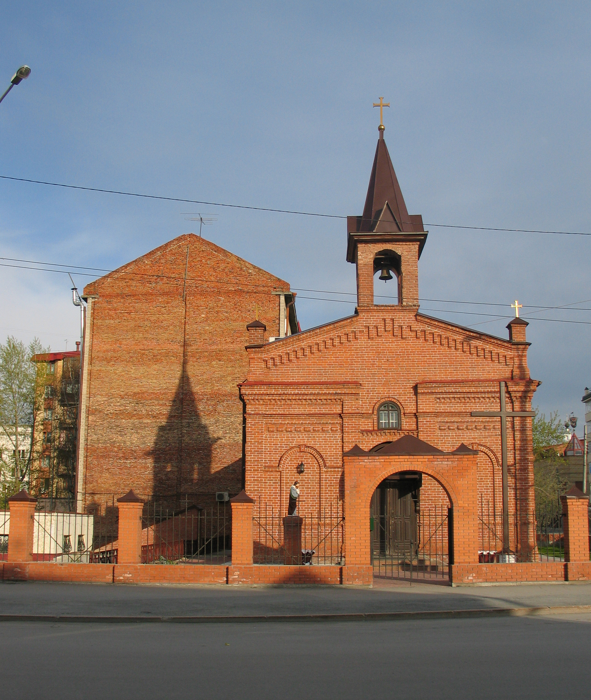 Костел: улица Ленина, 7, Тюмень, Тюменская область